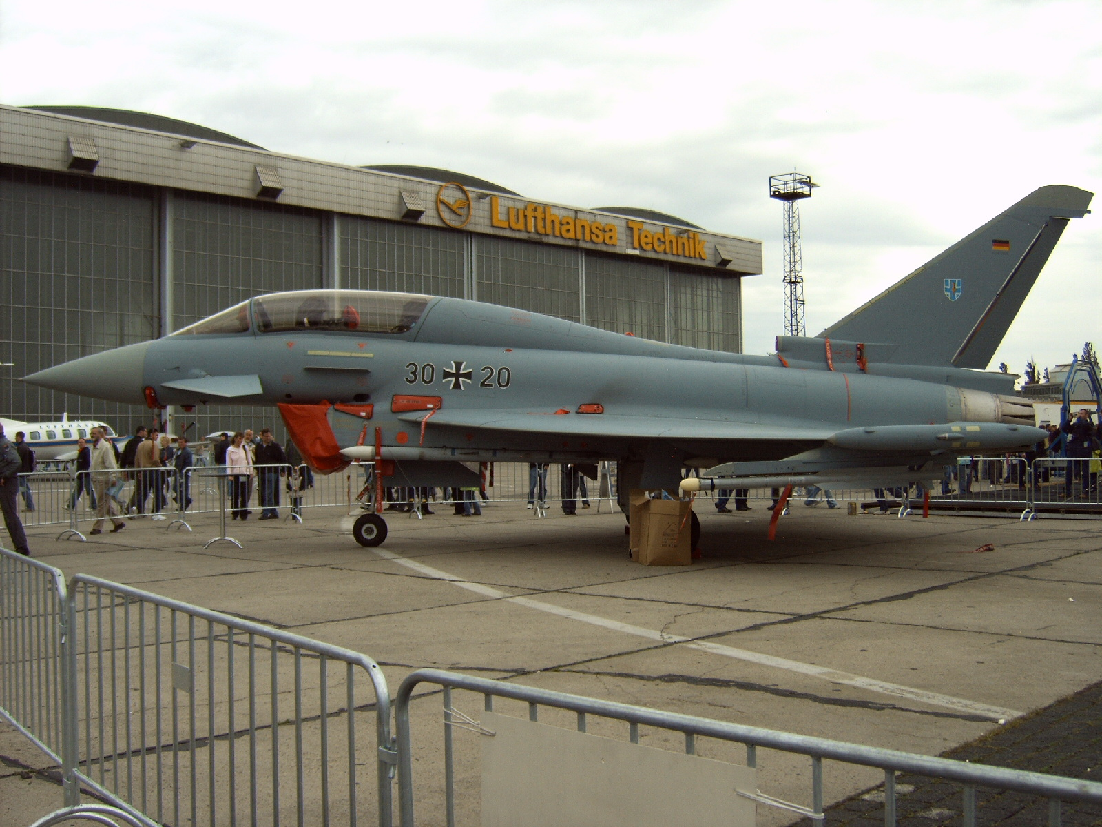 Eurofighter auf der ILA in Berlin